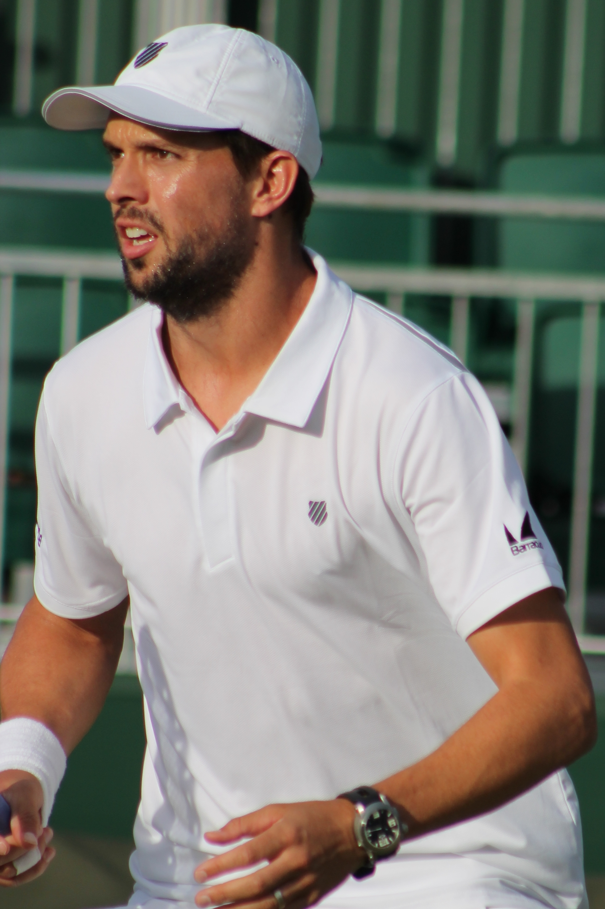 Bryan M. WM15 (6)